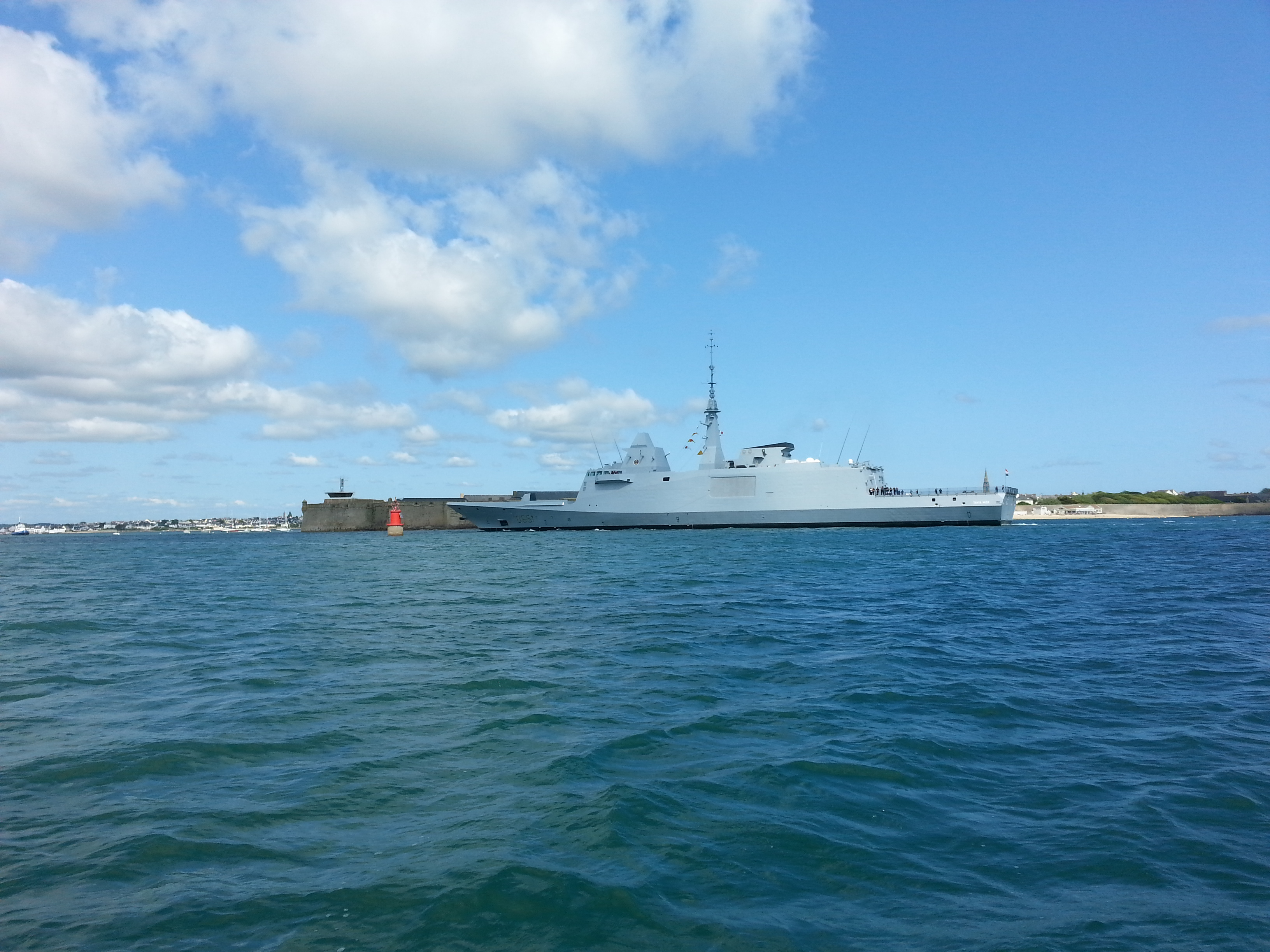 La frégate FREMM Tahya Misr rentre à Lorient après des essais en mer.